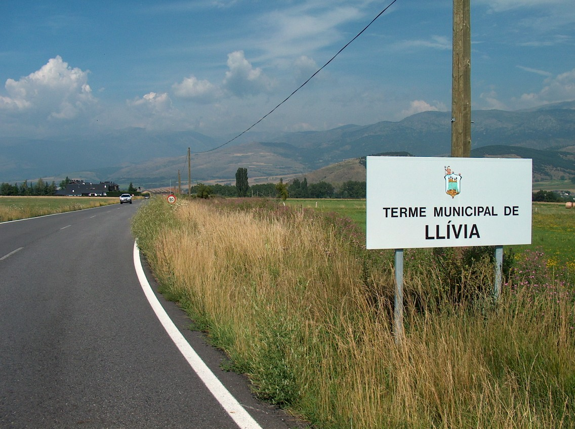 Terme municipal de Llívia, exclavament de la Baixa Cerdanya (Girona) dins França.